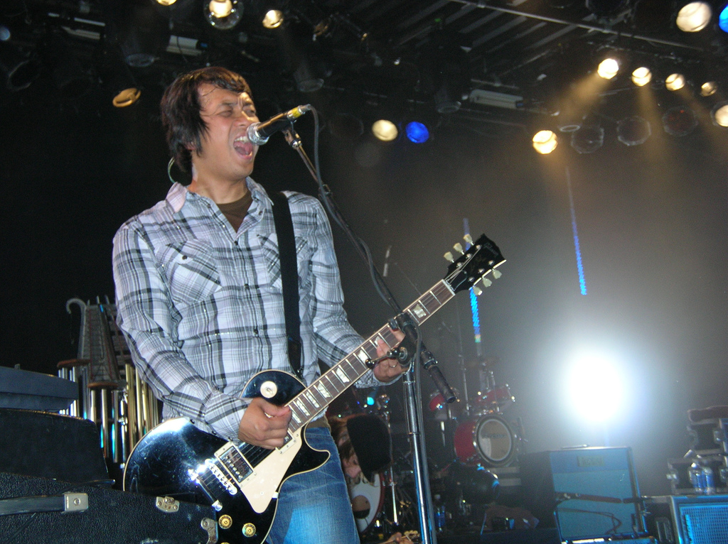 Гитарист группы Switchfoot